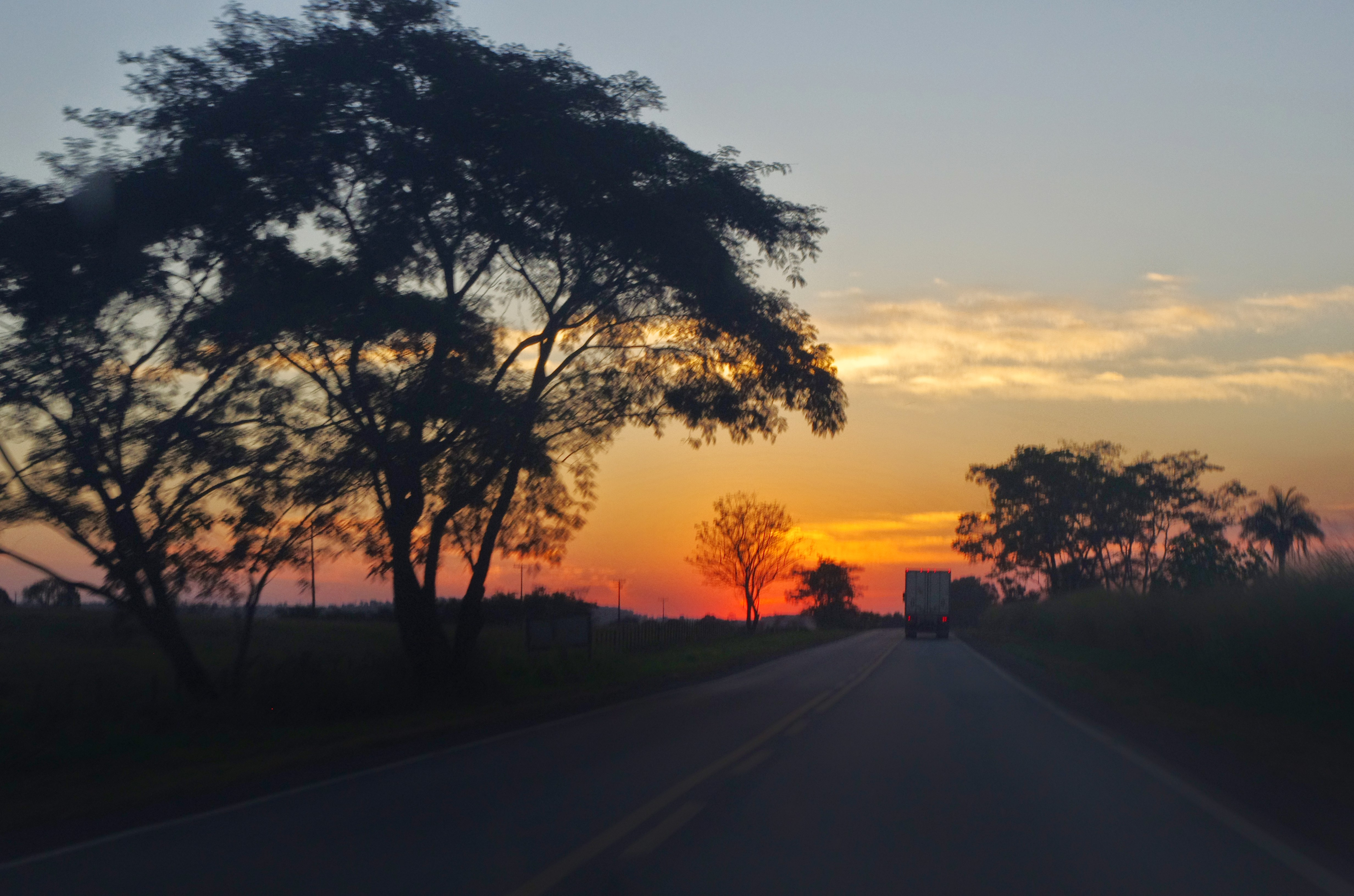 Chapadão do Sul - State of Mato Grosso do Sul, Brazil